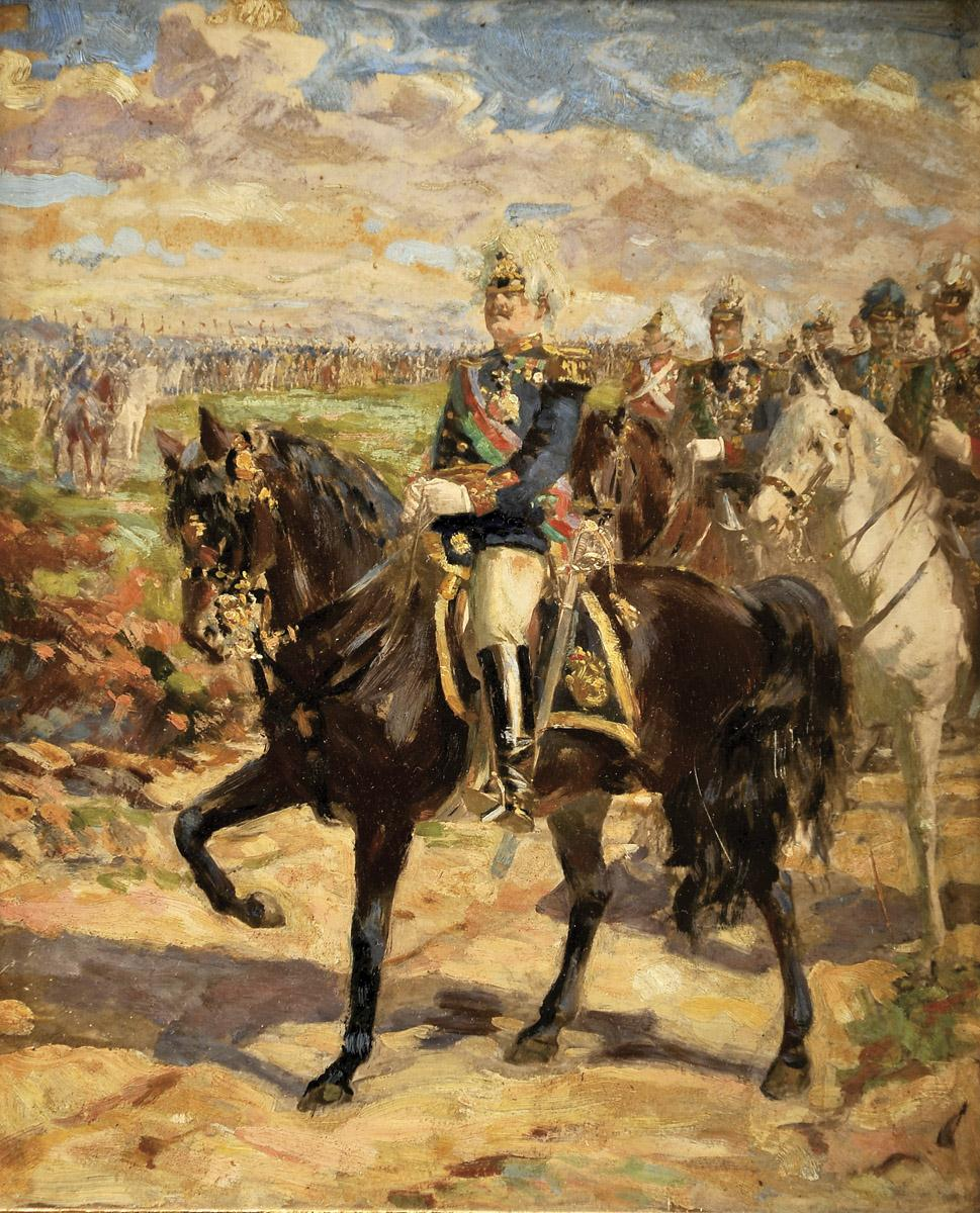 O monarca veste uniforme de generalíssimo, montado no seu cavalo "Cursito", acompanhado imediatamente por trás, pelo seu 1º Ajudante de Campo, General Francisco Higino Craveiro Lopes, montando um cavalo branco e pelos Generais Francisco Maria da Cunha, Malaquias de Lemos, D. António de Noronha, Duval Teles.